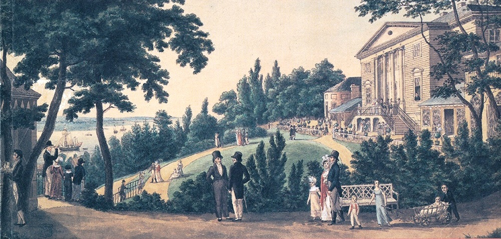 In dem Landhaus, das Christian Frederik Hansen am Elbhang von Ottensen 1795 für Balthasar Elias Abbema errichtet hatte, betrieb César Claude Rainville (1767-1845) ab 1798/99 ein Restaurant, dessen Ruhm sich in ganz Europa verbreitete. 1867 wurde das Haus abgebrochen.